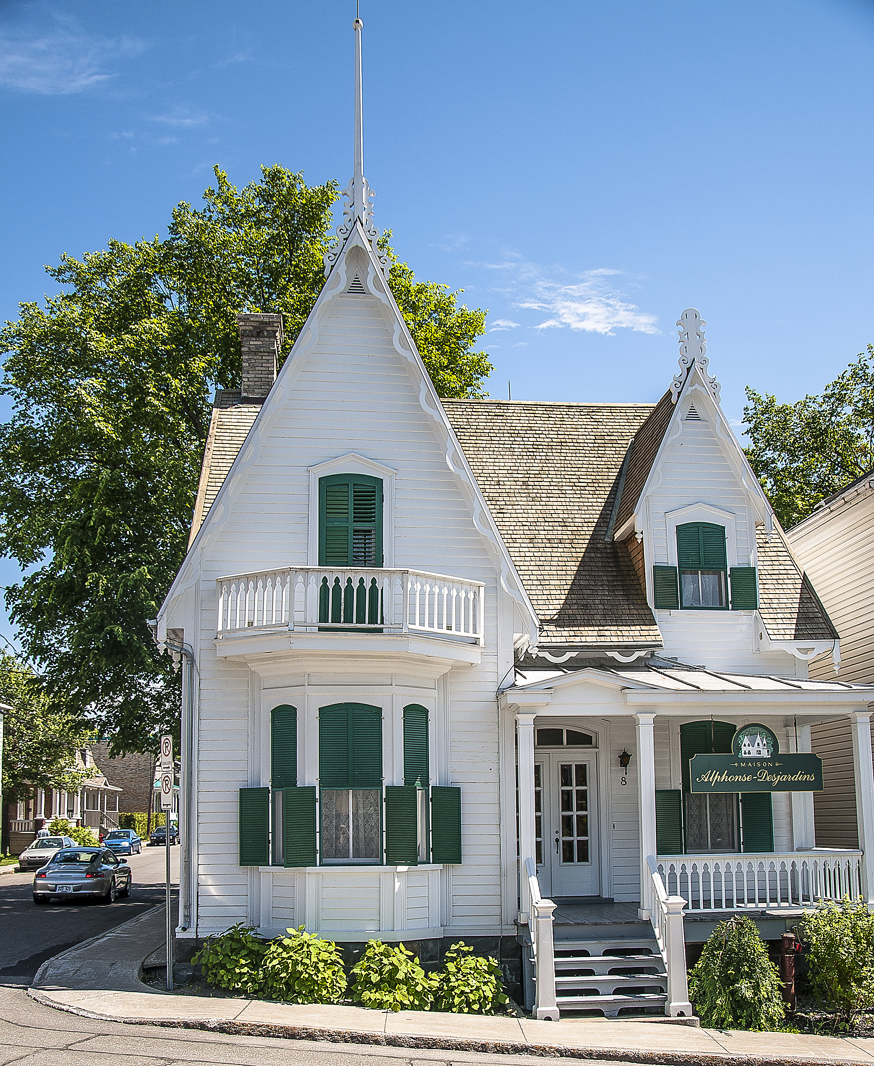 Maison d'Alphonse Desjardins, fondateur de la fédération des caisse Desjardins du Québec